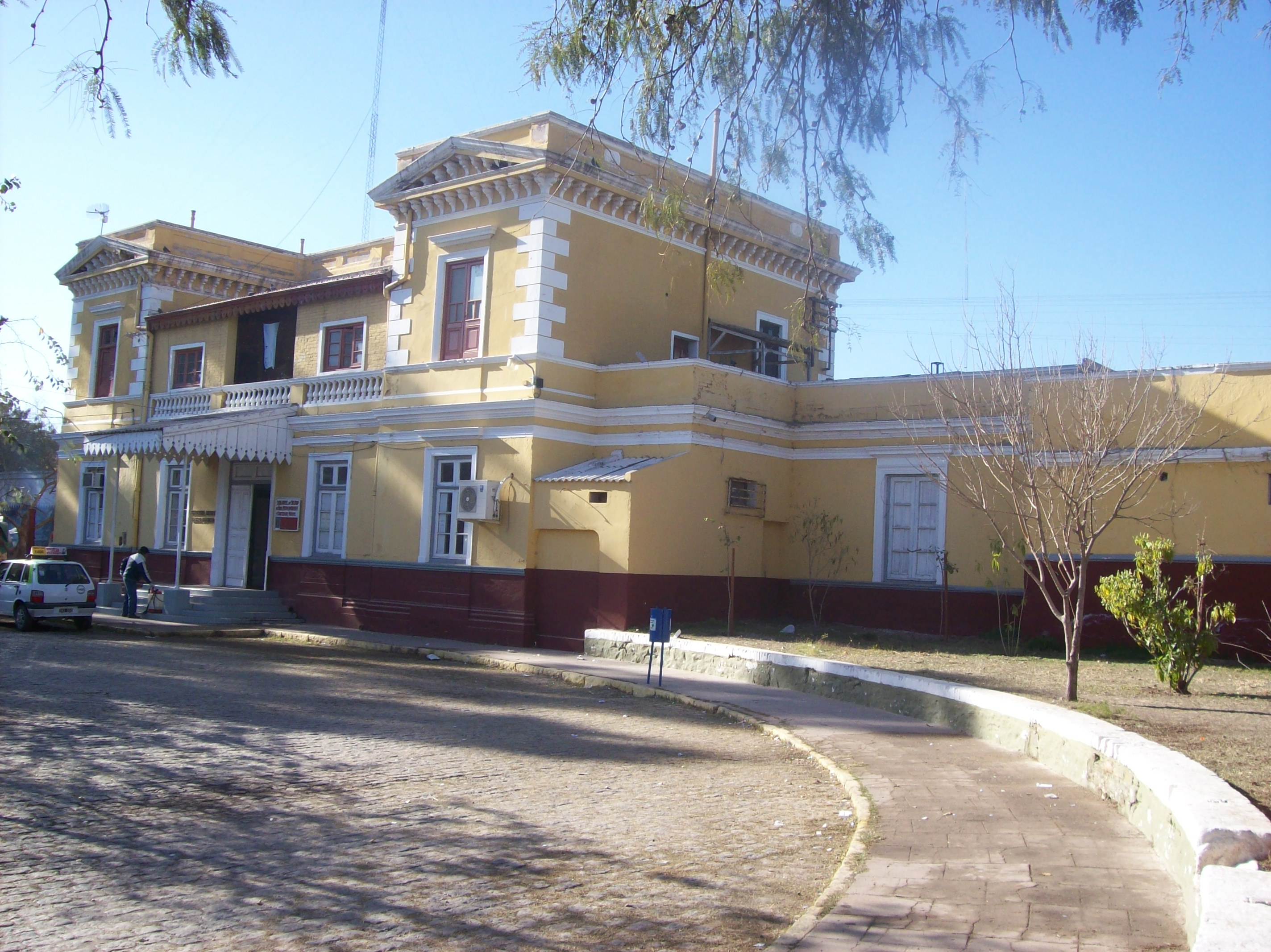 Frente de la antigua estación Santiago del Estero, con las vías levantadas. A la izquierda de la puerta principal se encuentra la leyenda "Ferrocarril Nacional General Belgrano" y a la derecha un cartel que indica "Subdirección de calidad de vida, medio ambiente y contralor municipal".